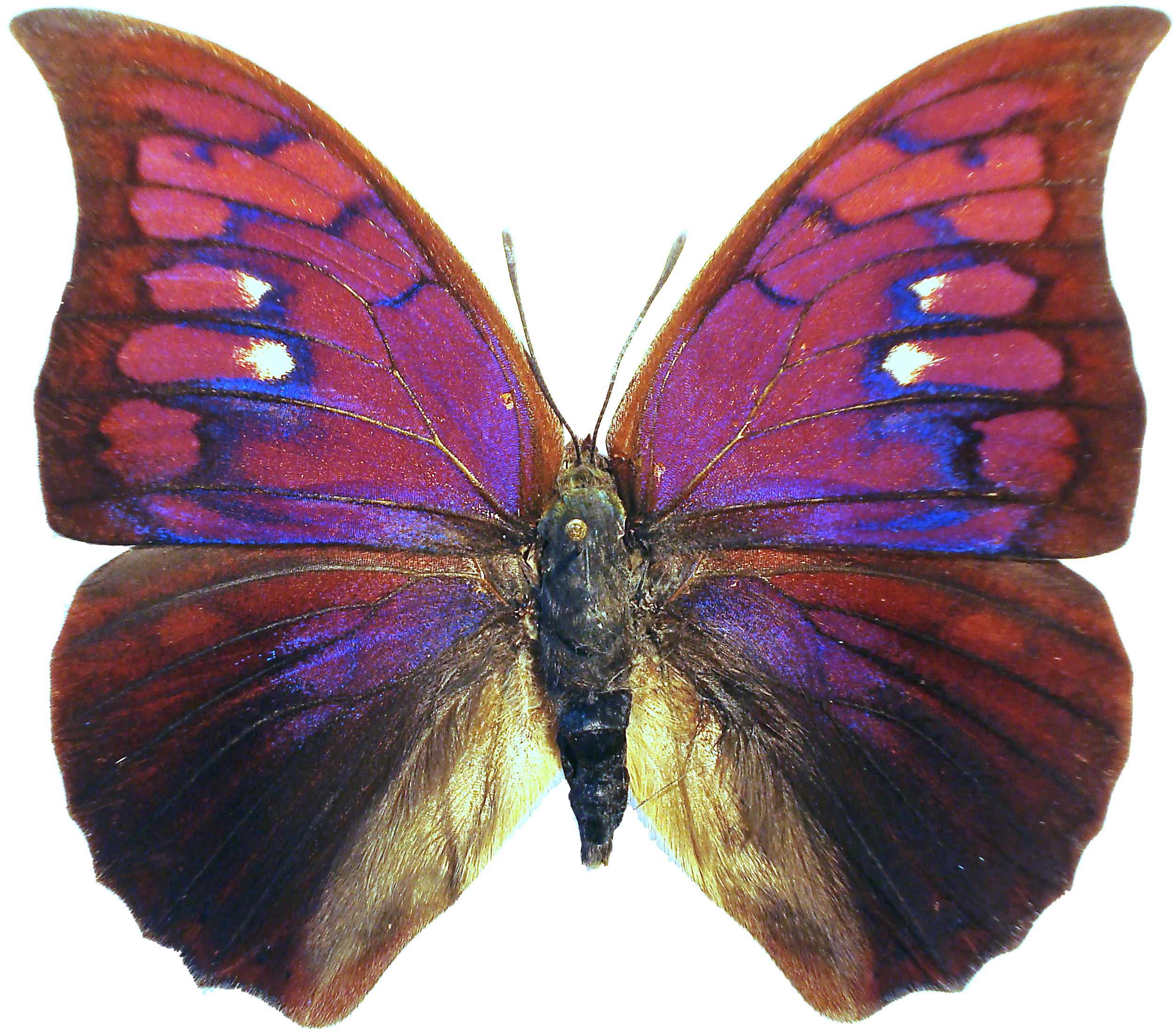 Polygrapha tyrianthina male de Satipo, Junin, Pérou